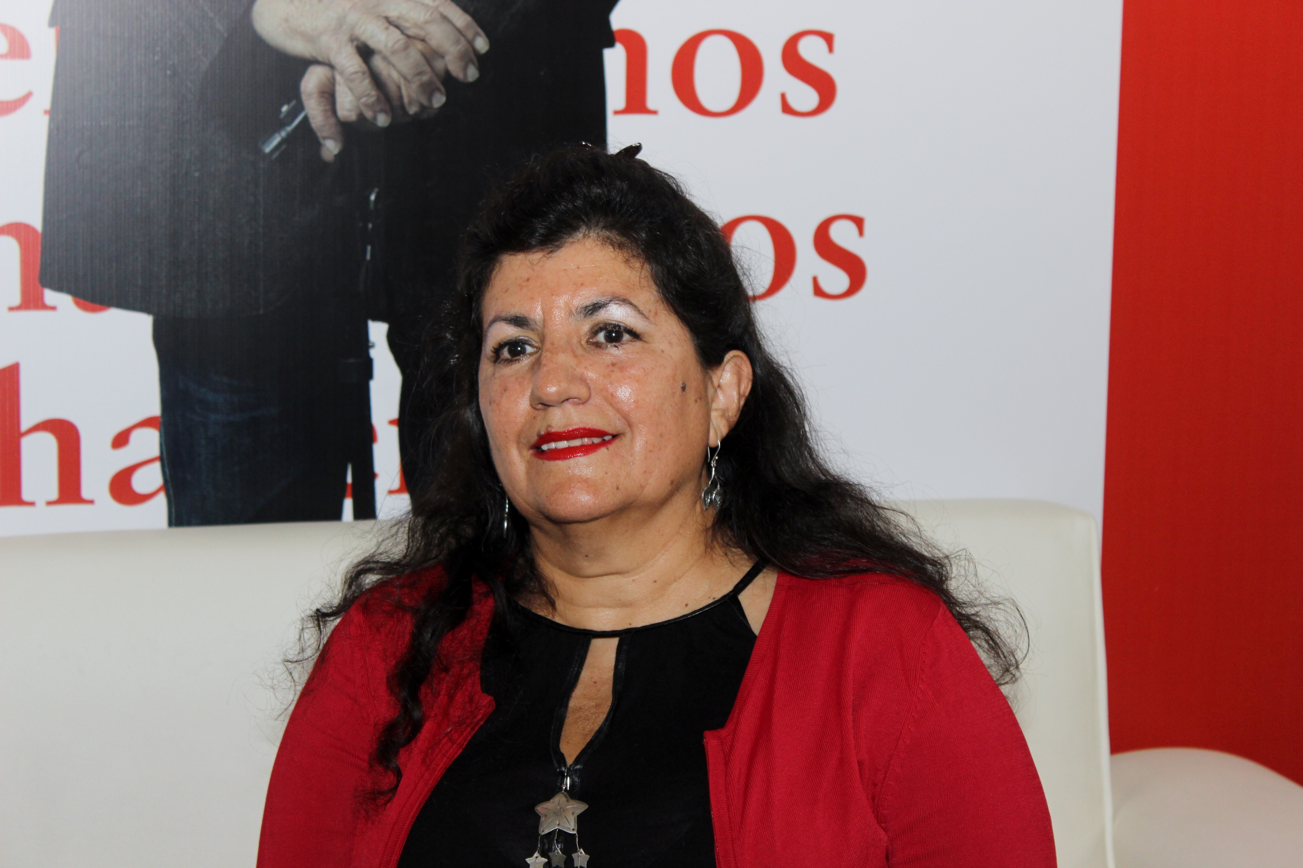 La escritora peruana Teresa Ruiz Rosas en la Feria Internacional del Libro de Santiago 2018.